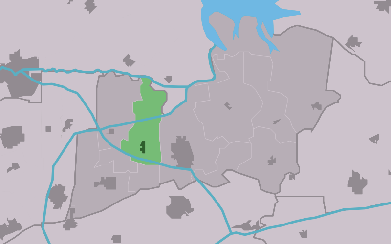 Kaartsje fan himrik fan Aldwâld